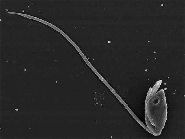 Percolomonas sp. / SEM:JEOL JSM-6330F